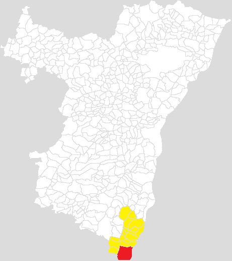 Communauté de communes du Ried de Marckolsheim